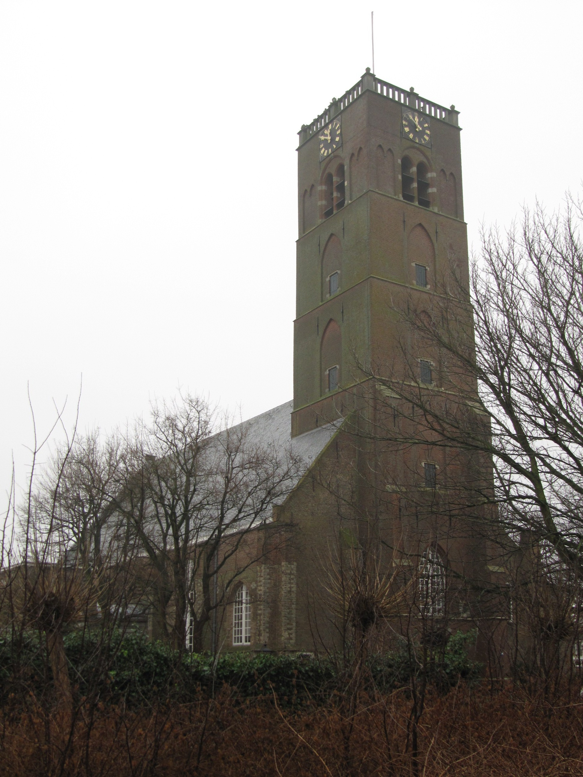 RM29841 Sommelsdijk - Marktveld (kerk).jpg